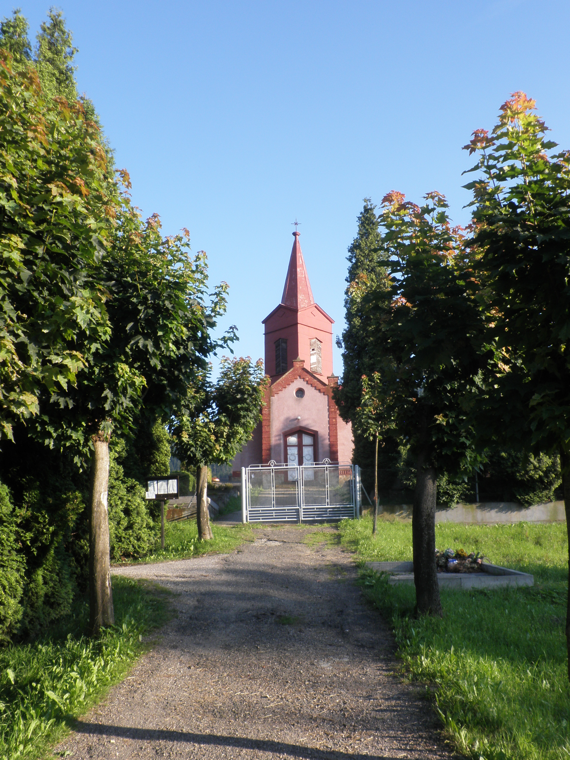 Kaple na evangelickém hřbitově v Oldřichovicích